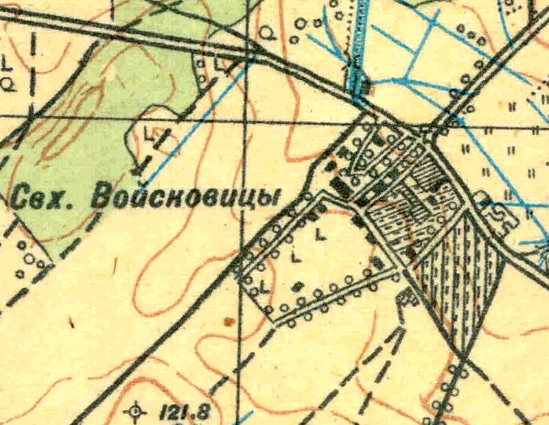 Топографическая карта Ленинградской области, квадрат О-35-24-Б-г (Б. Борницы), деревня Войсковицы